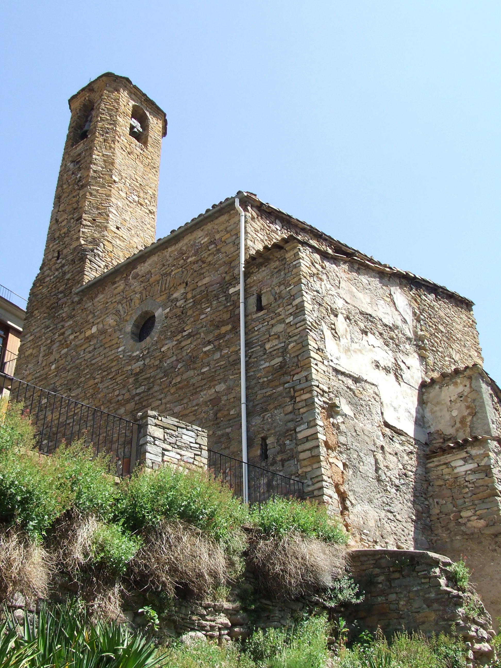 Església parroquial d'Erinyà (Toralla i Serradell, Conca de Dalt, Pallars Jussà)